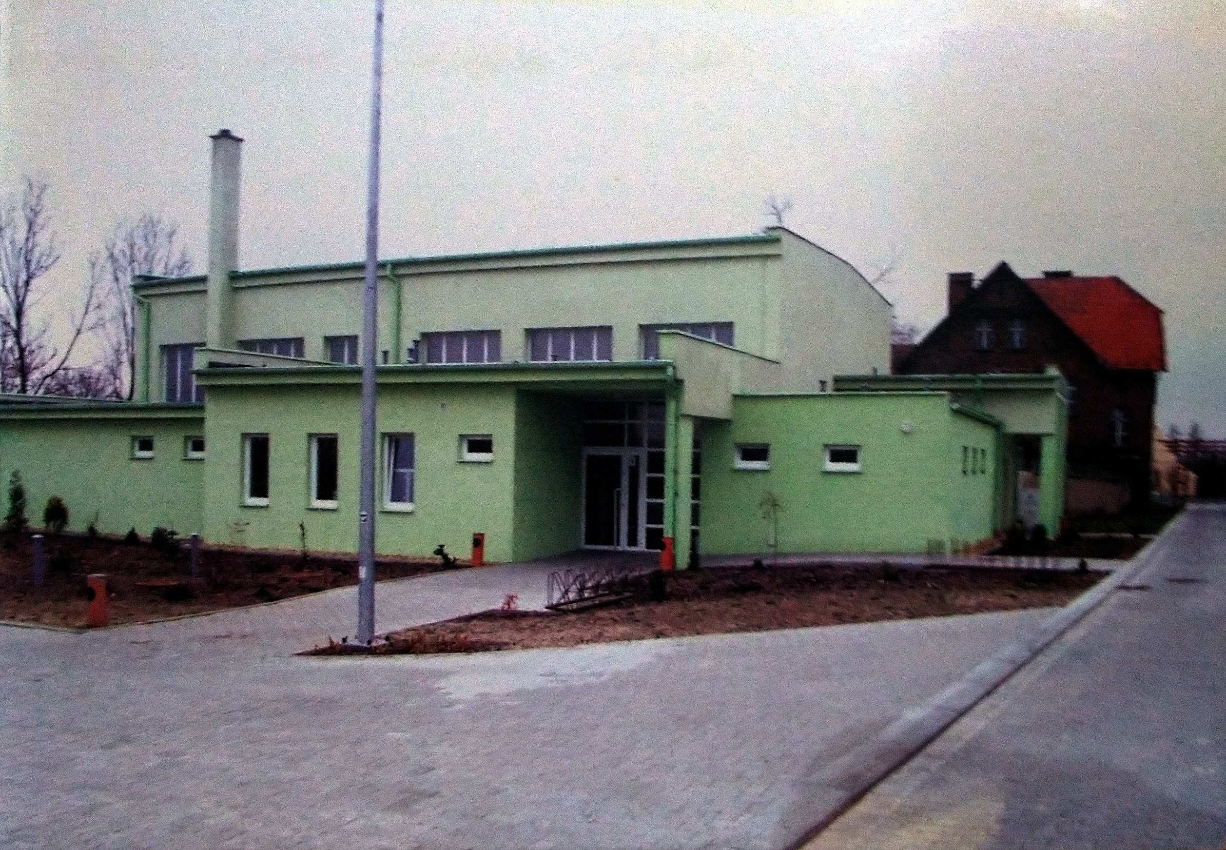 Centrum Sportowe w Niemysłowicach